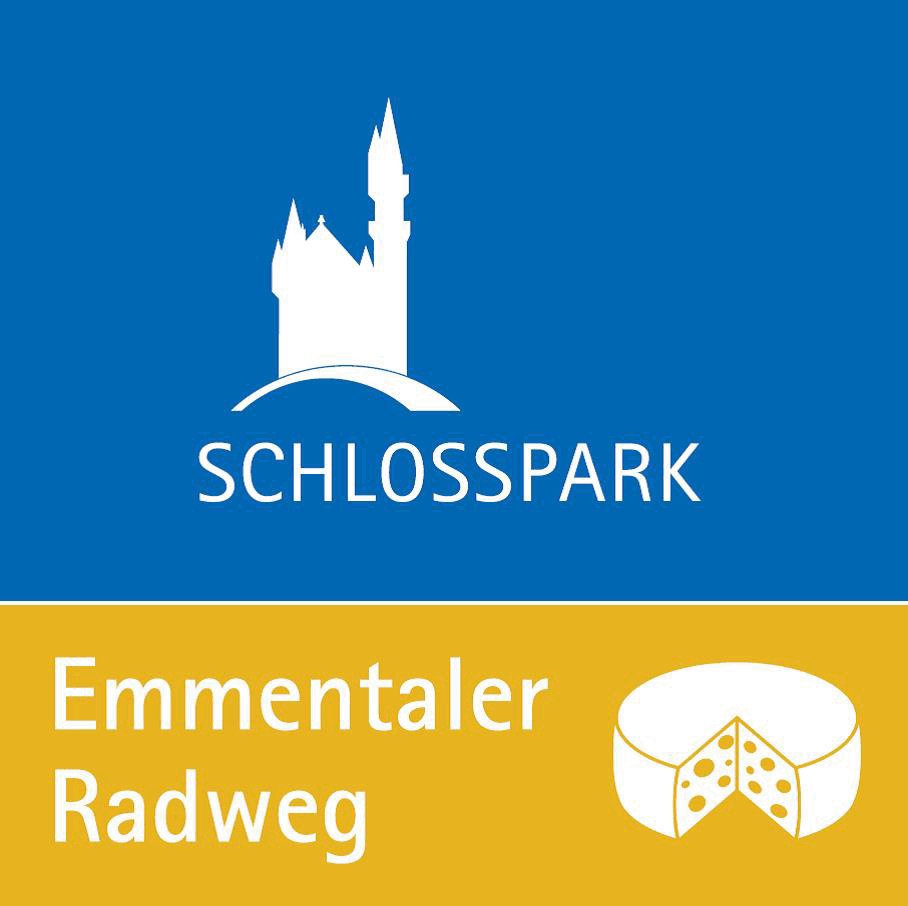 Logo Emmentaler Radweg